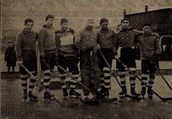 Ilustracja do artykułu "Zawody hokejowe w Gnieźnie, Poznaniu i Warszawie". Opis oryginalny zdjęcia: "Pierwsza drużyna hokejowa gnieźnieńskiej Stelli z poznańską Lechją udowodniła ponownie, że na swojem boisku jest groźnym przeciwnikiem". Mecz rozegrany w styczniu 1930 r. zakończył się remisem 3:3.